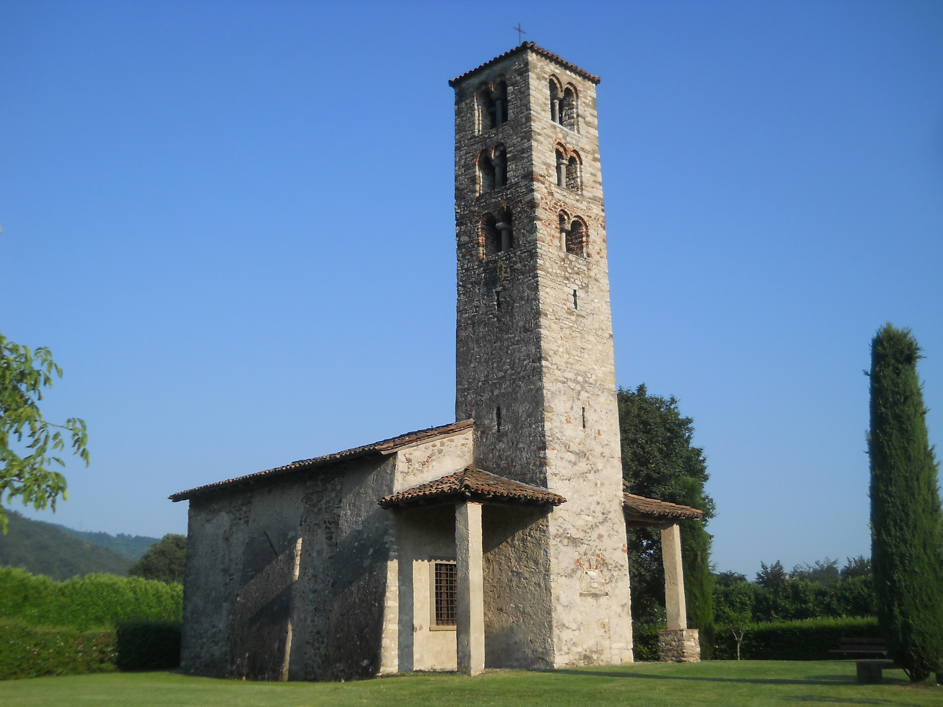 Chiesa romanica di San Fermo, situata a Credaro (provincia di Bergamo)